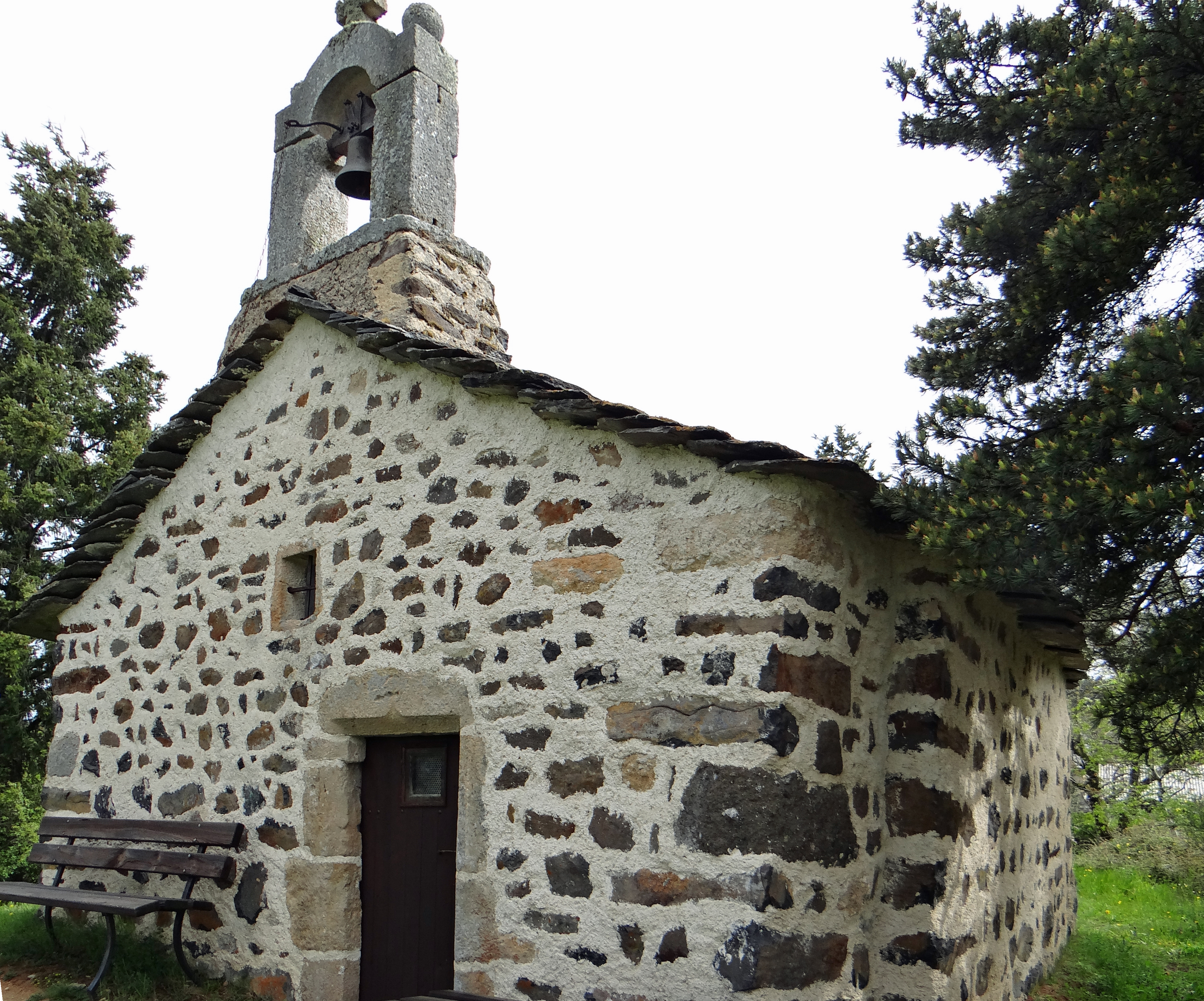 Saint-Julien-Chapteuil - Chapelle de la Chapelette - Façade et cloche